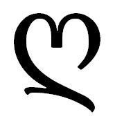 гхани